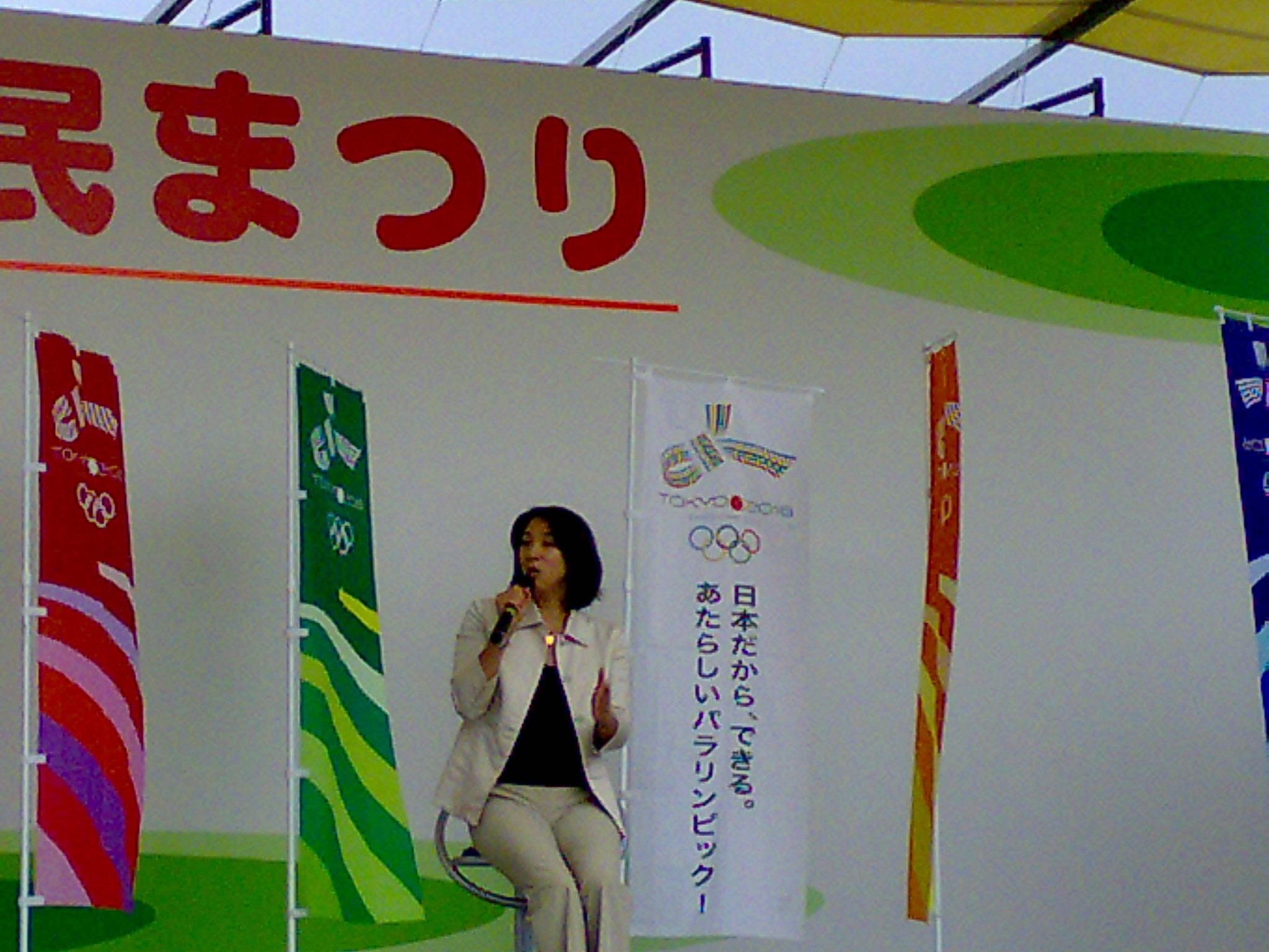 Koto-ku, Tokyo, Japan.